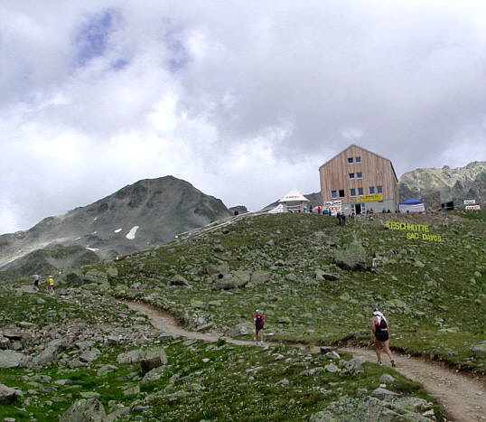 Kilometer 53 beim Swiss Alpine Marathon 2002 vor der Keschhütte in guten 2600 m Höhe. Weitere Bilder und Bericht zum K78 2002